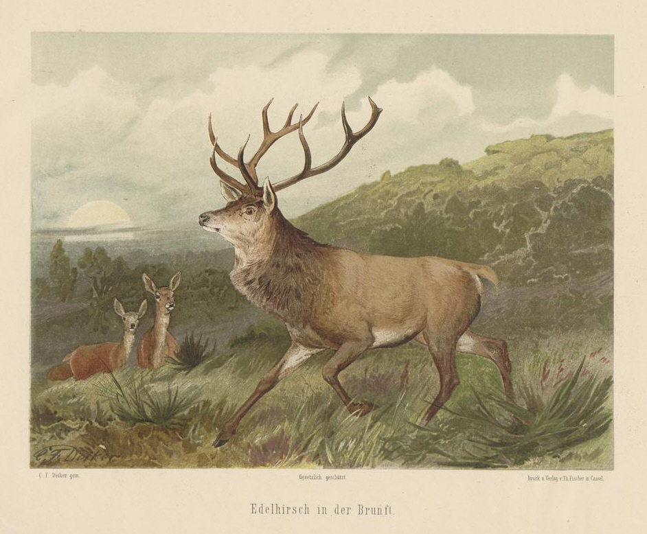 Chromolithographie aus der Serie „Jagdbare Thiere“ von Carl Friedrich Deiker Edelhirsch in der Brunft